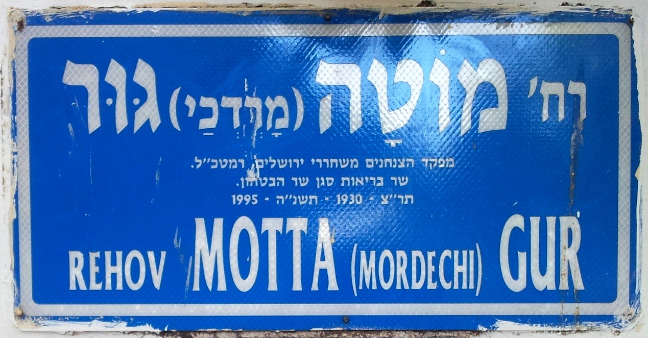 שלט רחוב מוטה גור, שכונת אפקה, תל אביב